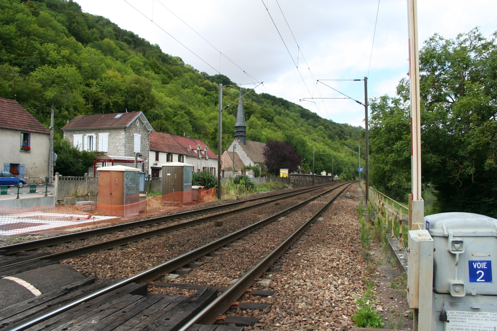 La ligne Paris-Rouen à la traversée de Jeufosse, Yvelines (France)